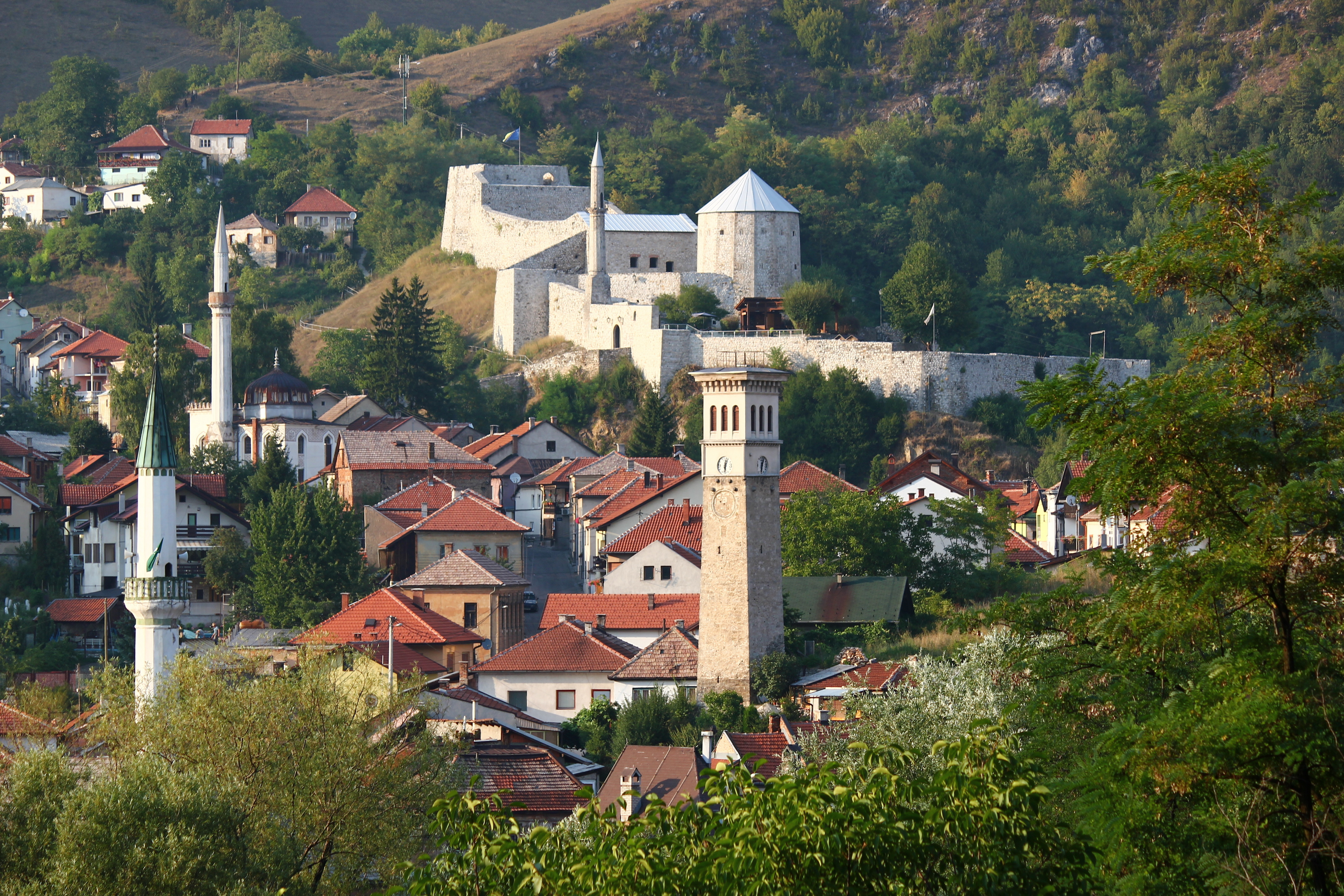 Altstadtpanorama von Travnik mit Festung und Uhrturm.